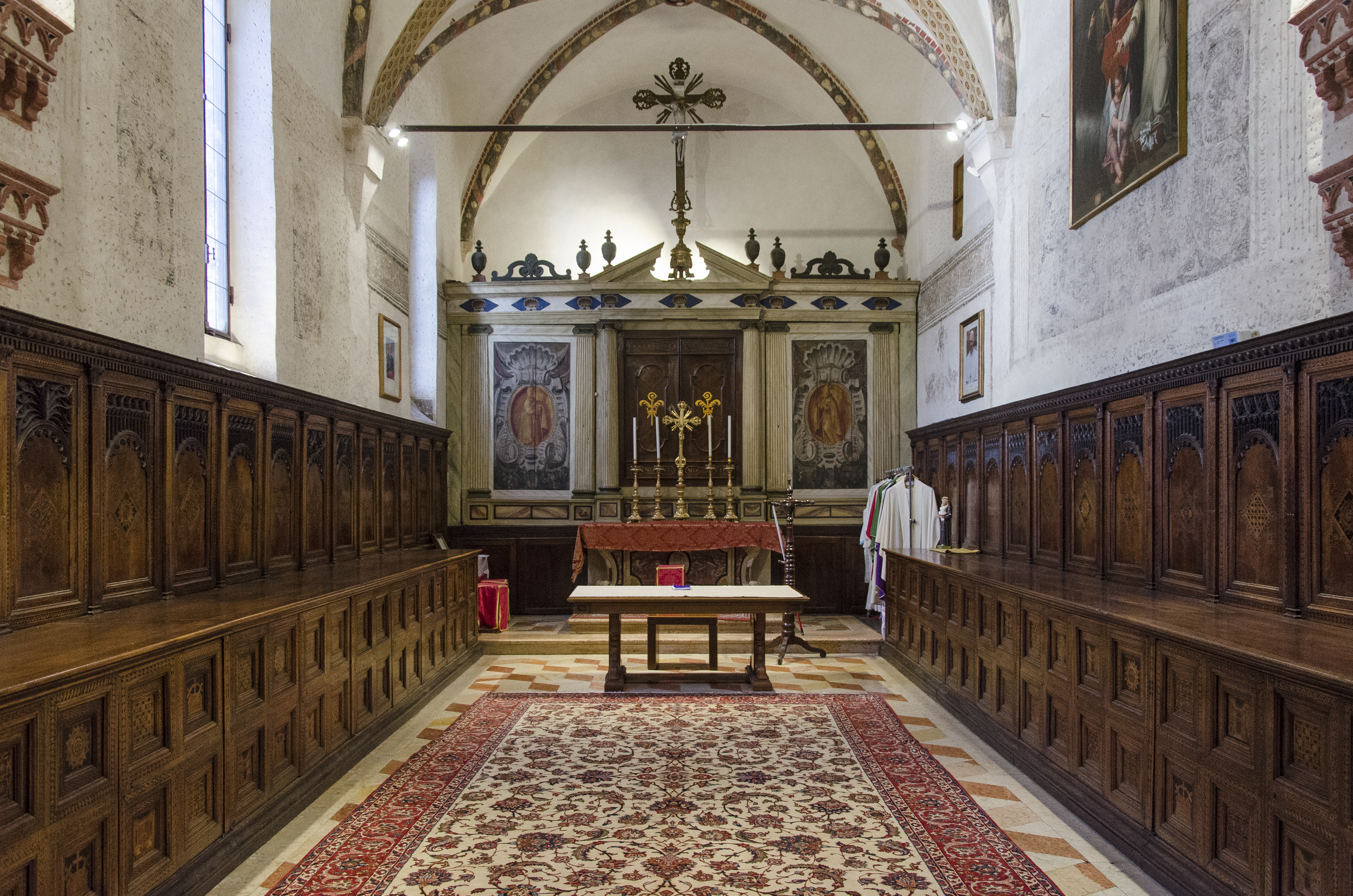 Chiesa dei Santi Nazaro e Celso a Verona. Interno, in stile rinascimentale.